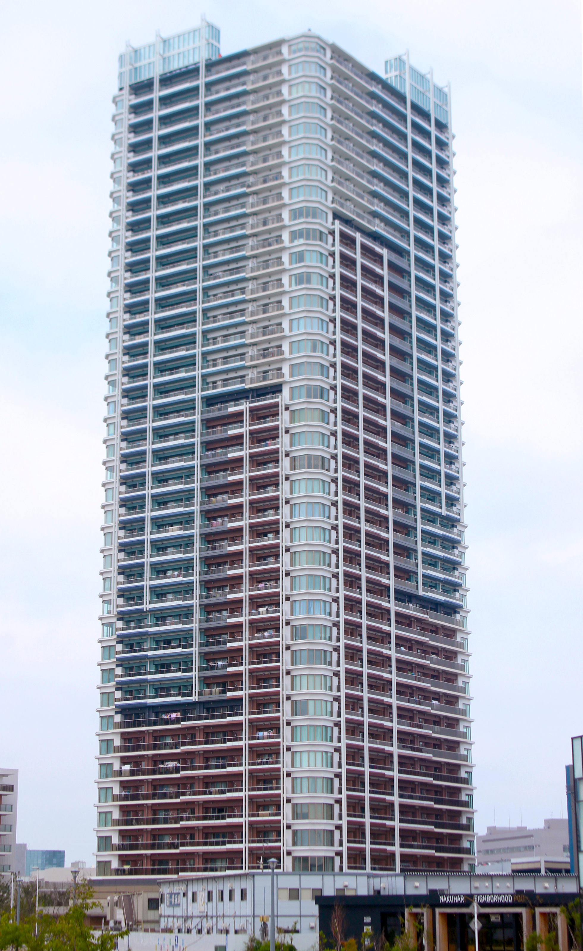 Makuhari Baypark Cross Tower